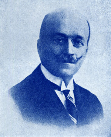 Антониос Карталис